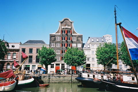 Dordrecht (Nederland). Wolwevershaven. In het midden: pakhuis Stokholm anno 1730.